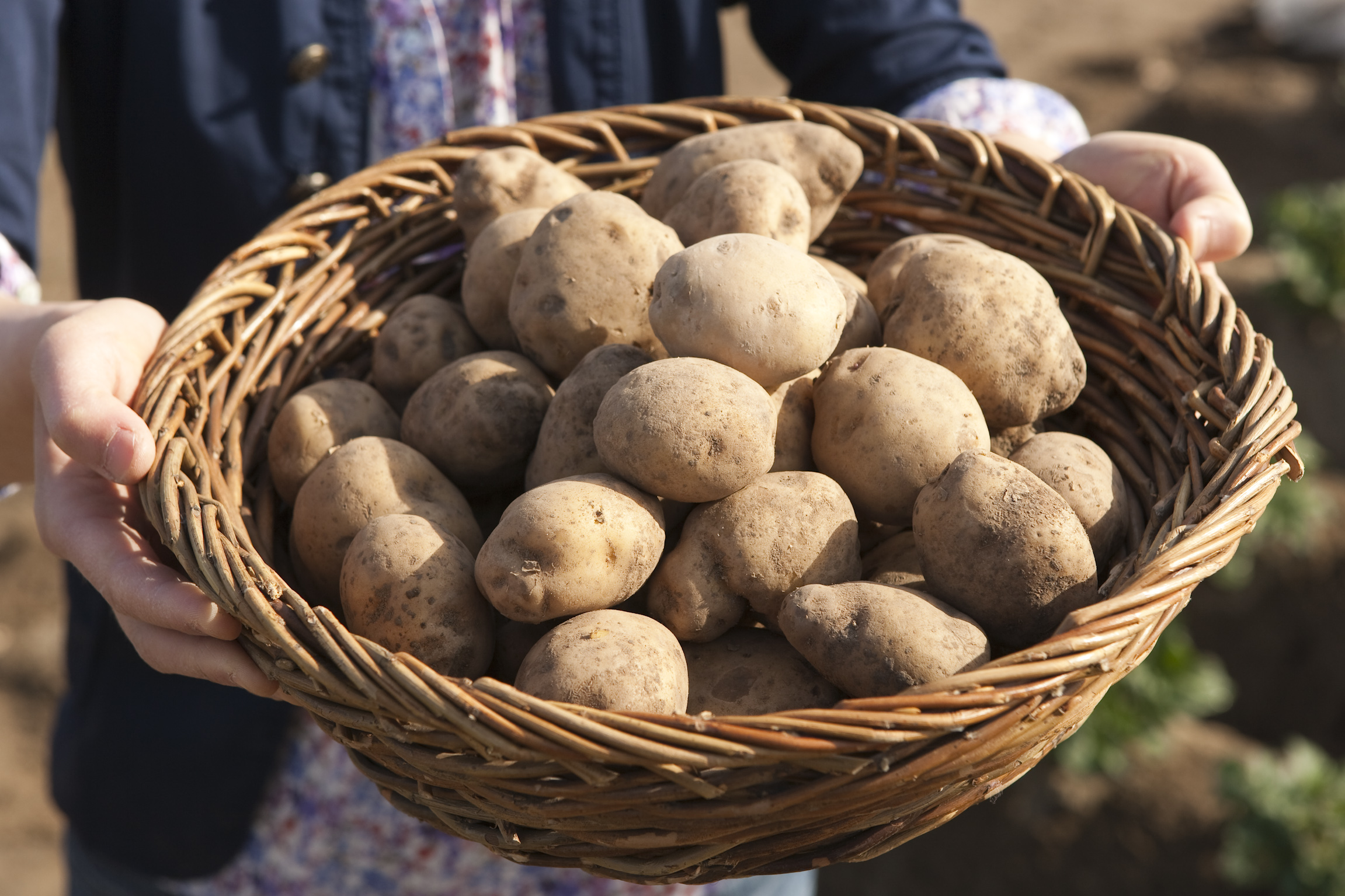 Amflora, die gentechnisch veränderte Stärkekartoffel der BASF, bildet reine Amylopektinstärke für technische Anwendungen. Herkömmliche Kartoffeln produzieren ein Stärkegemisch aus Amylopektin und Amylose. In vielen technischen Anwendungen der Papier-, Garn- oder Klebstoffindustrie ist reines Amylopektin vorteilhaft, weil es nicht geliert.